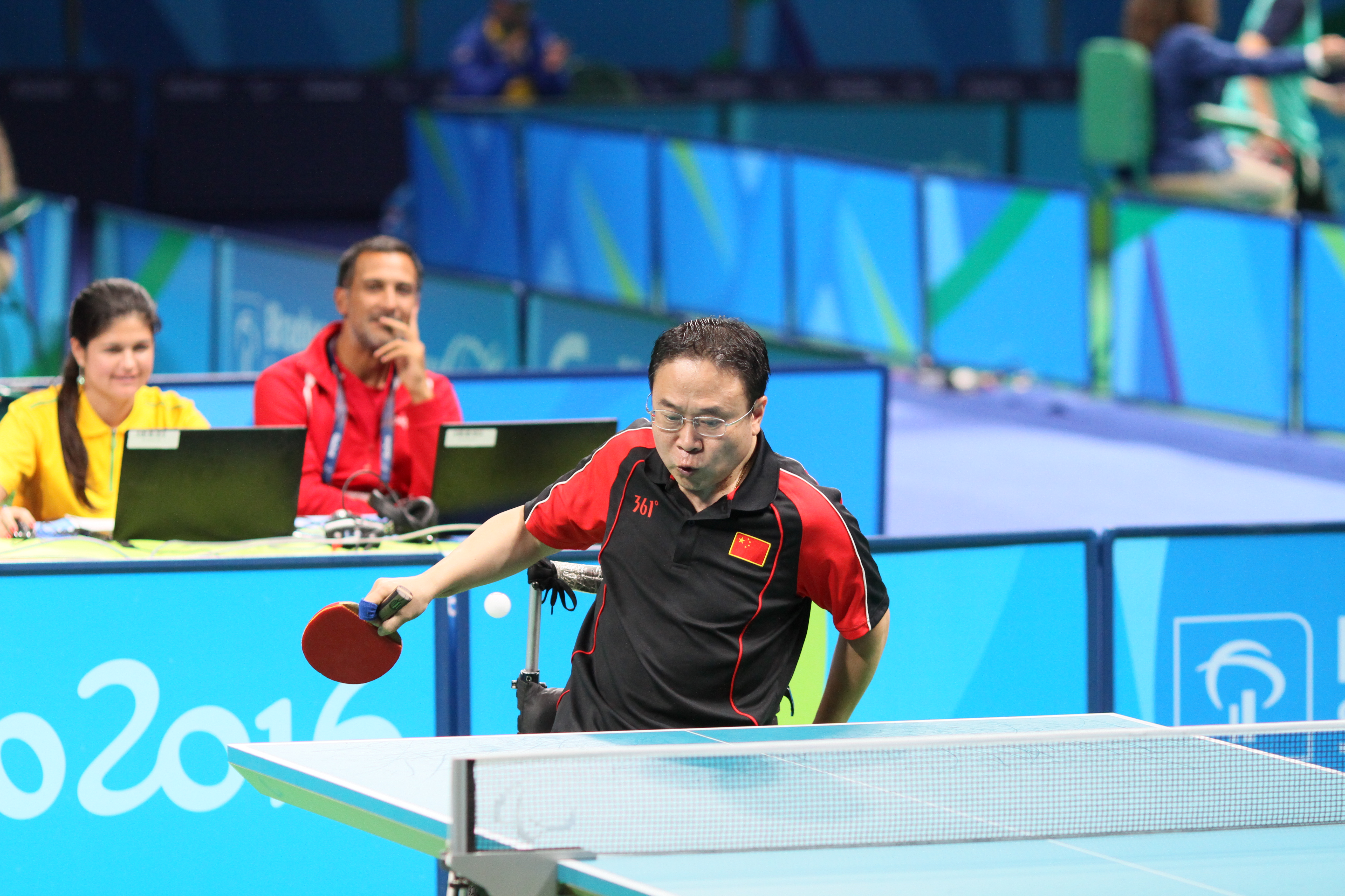 ZHANG Yan (CHN,M4) IMG_5399